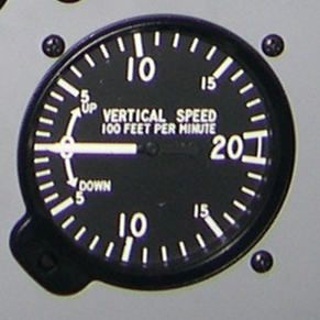 variometer